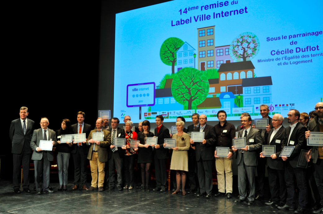 Cérémonie de remise du 14e Label Ville Internet